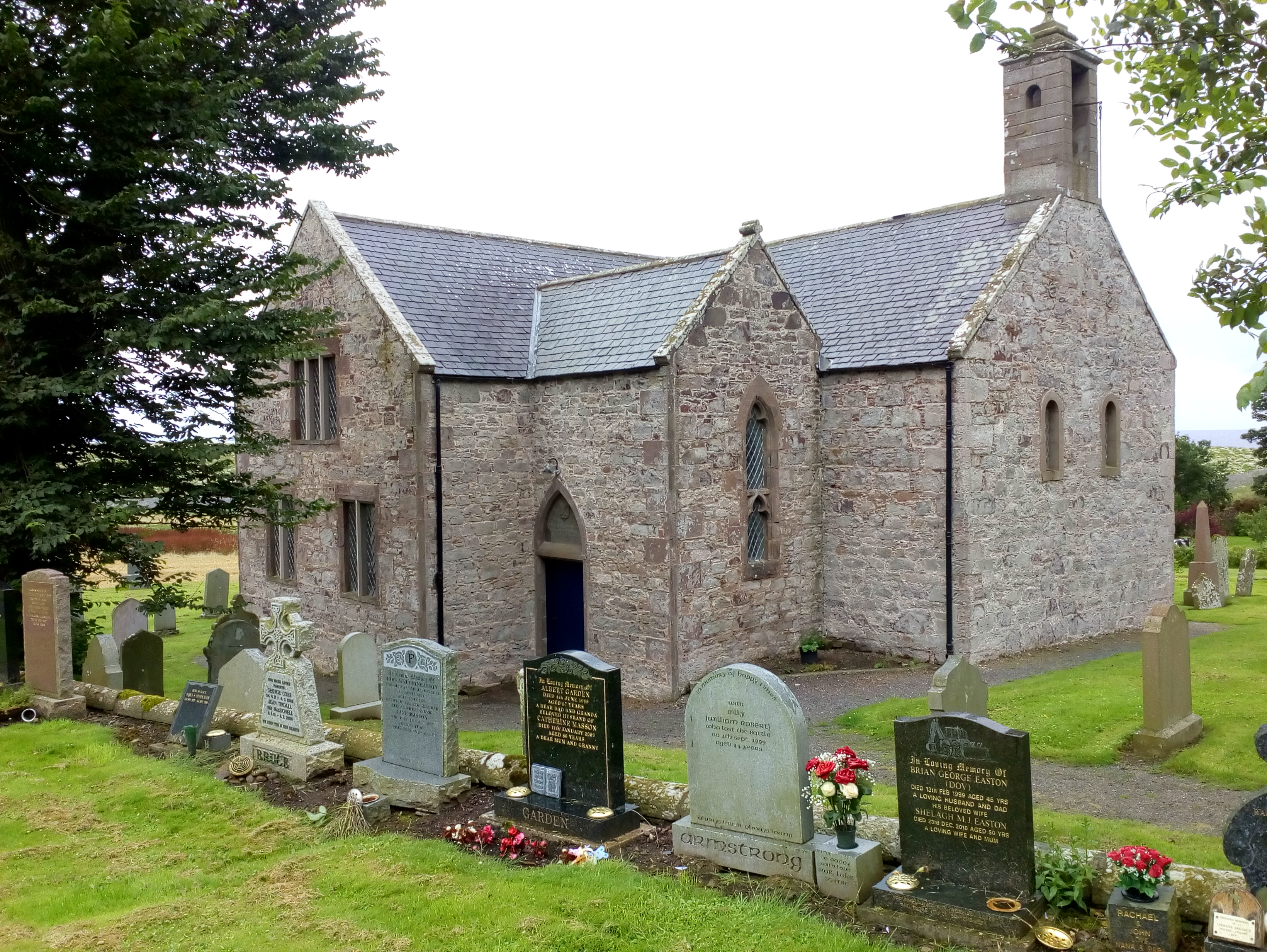 Kinneff Old Kirk in 2017